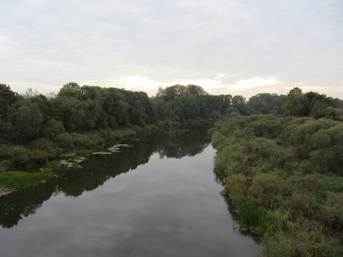 Германавічы.